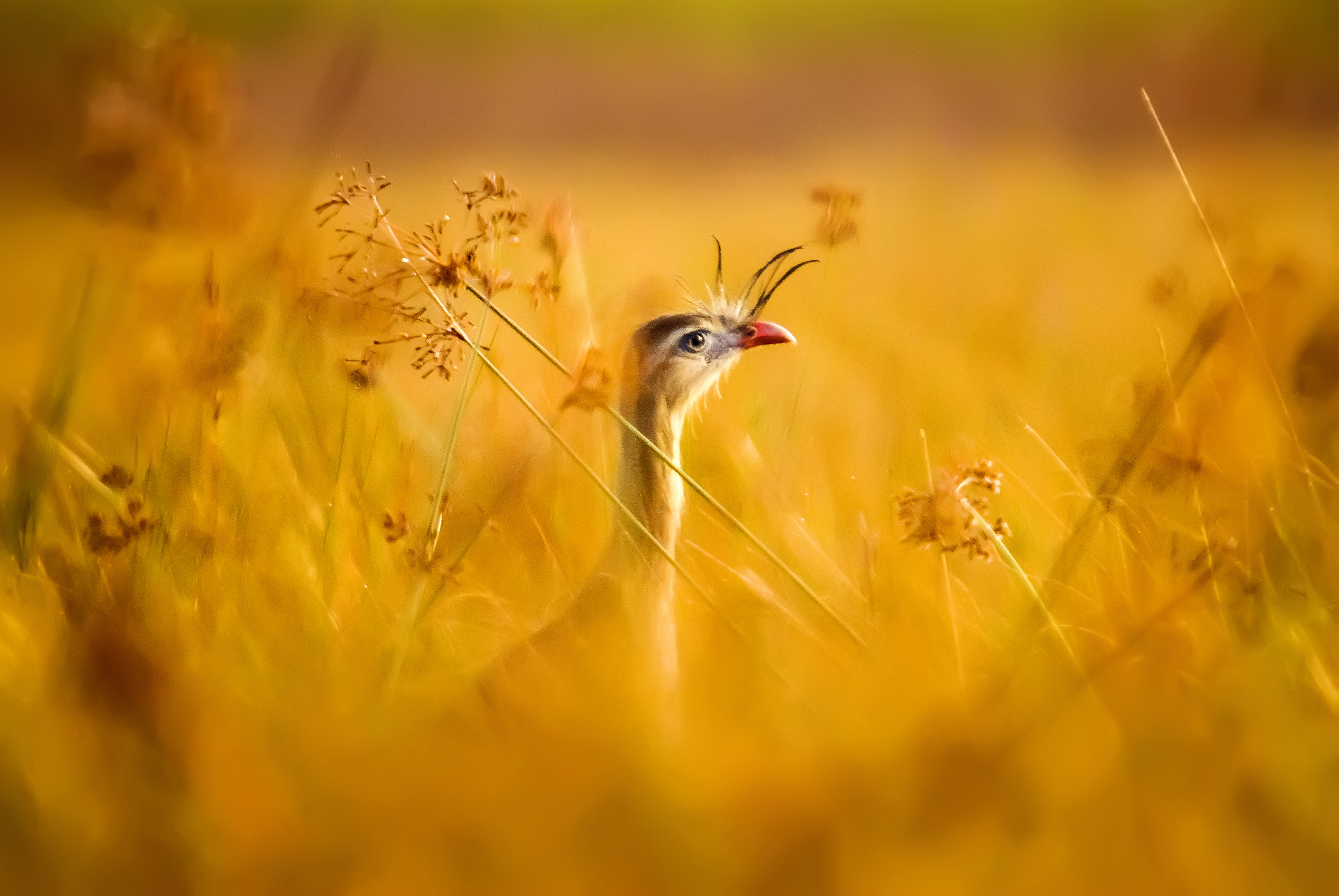 Seriema fotografada no Parque Estadual Paulo Cesar Vinha (PEPCV), Guarapari/ES.